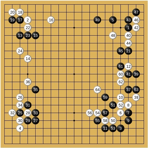 第16期本因坊戦リーグプレーオフ 坂田栄男 3目半目勝 木谷實